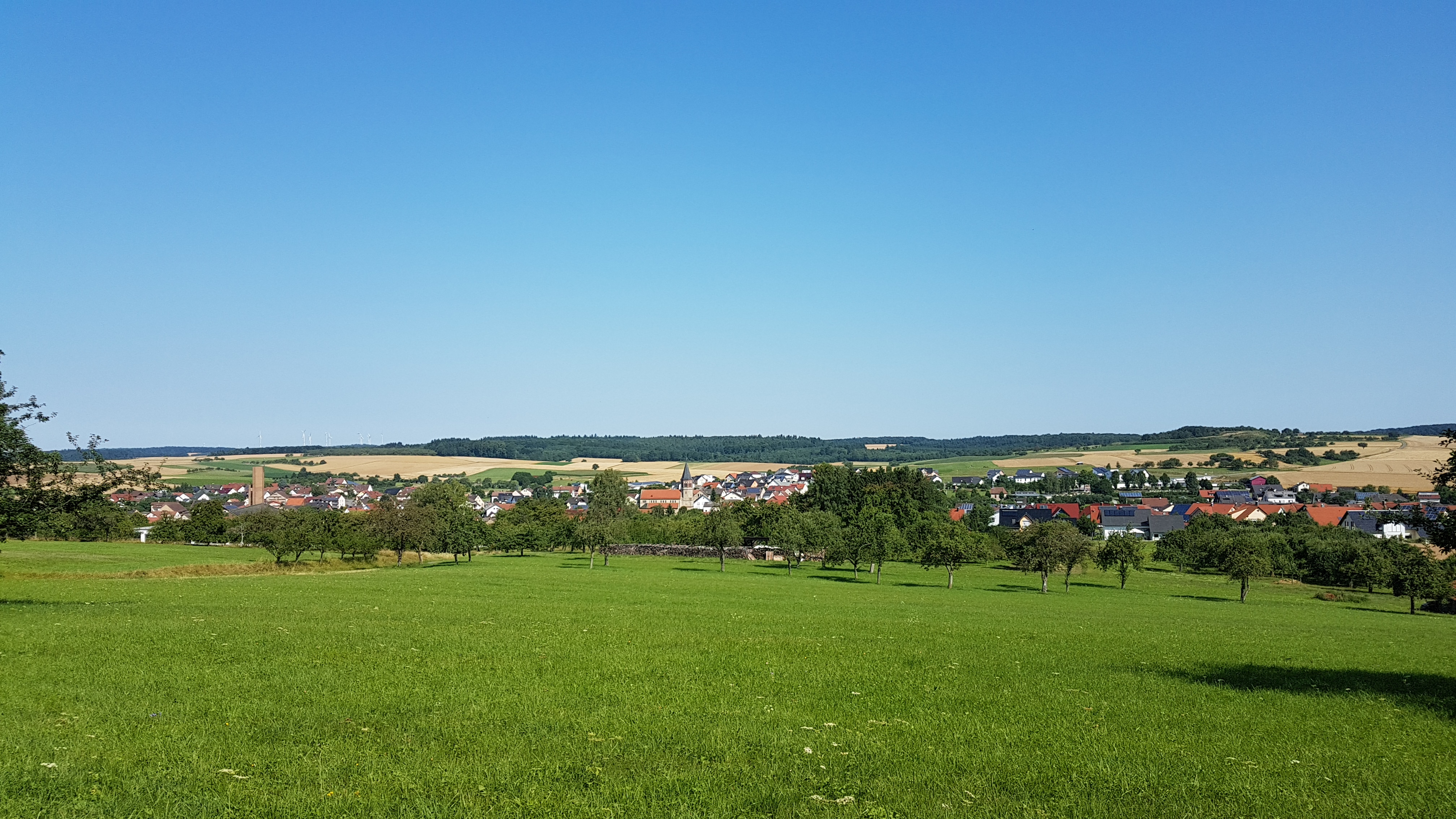 Blick auf Assamstadt. Im Vordergrund das "Landschaftsschutzgebiet Assamstadt".